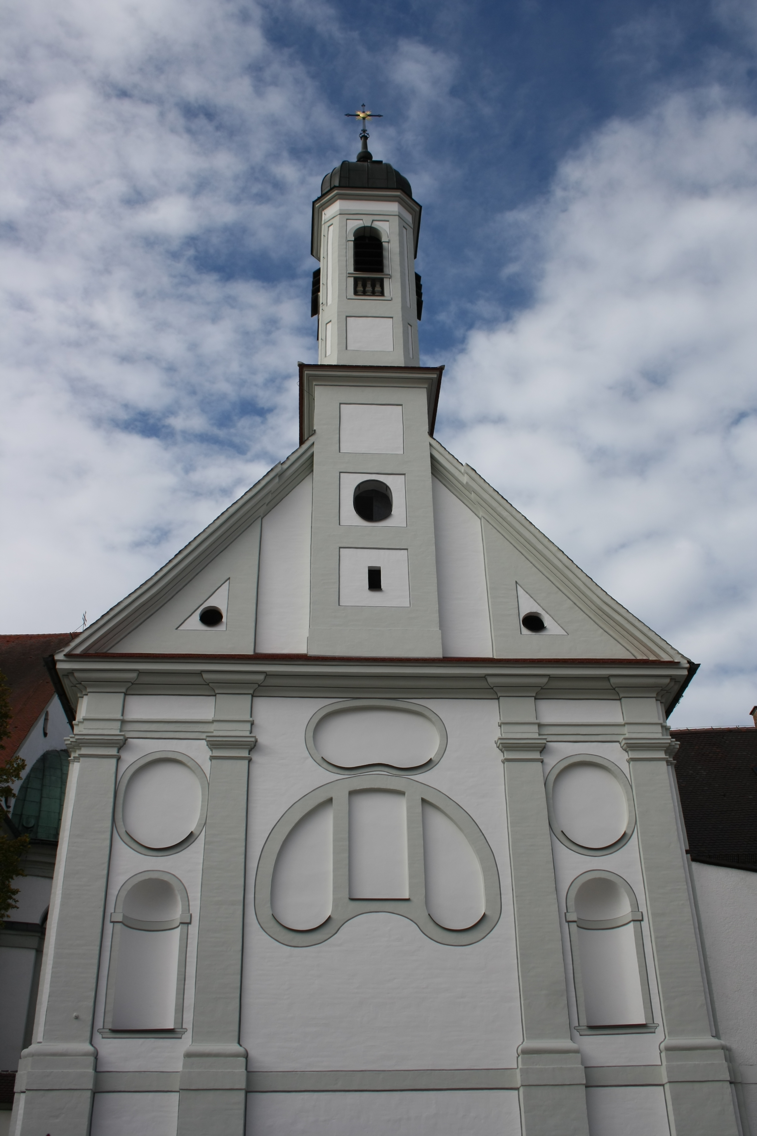 Klosterkirche Mariä Himmelfahrt der Dillinger Franziskanerinnen in Dillingen an der Donau, Südfassade mit Dachreiter